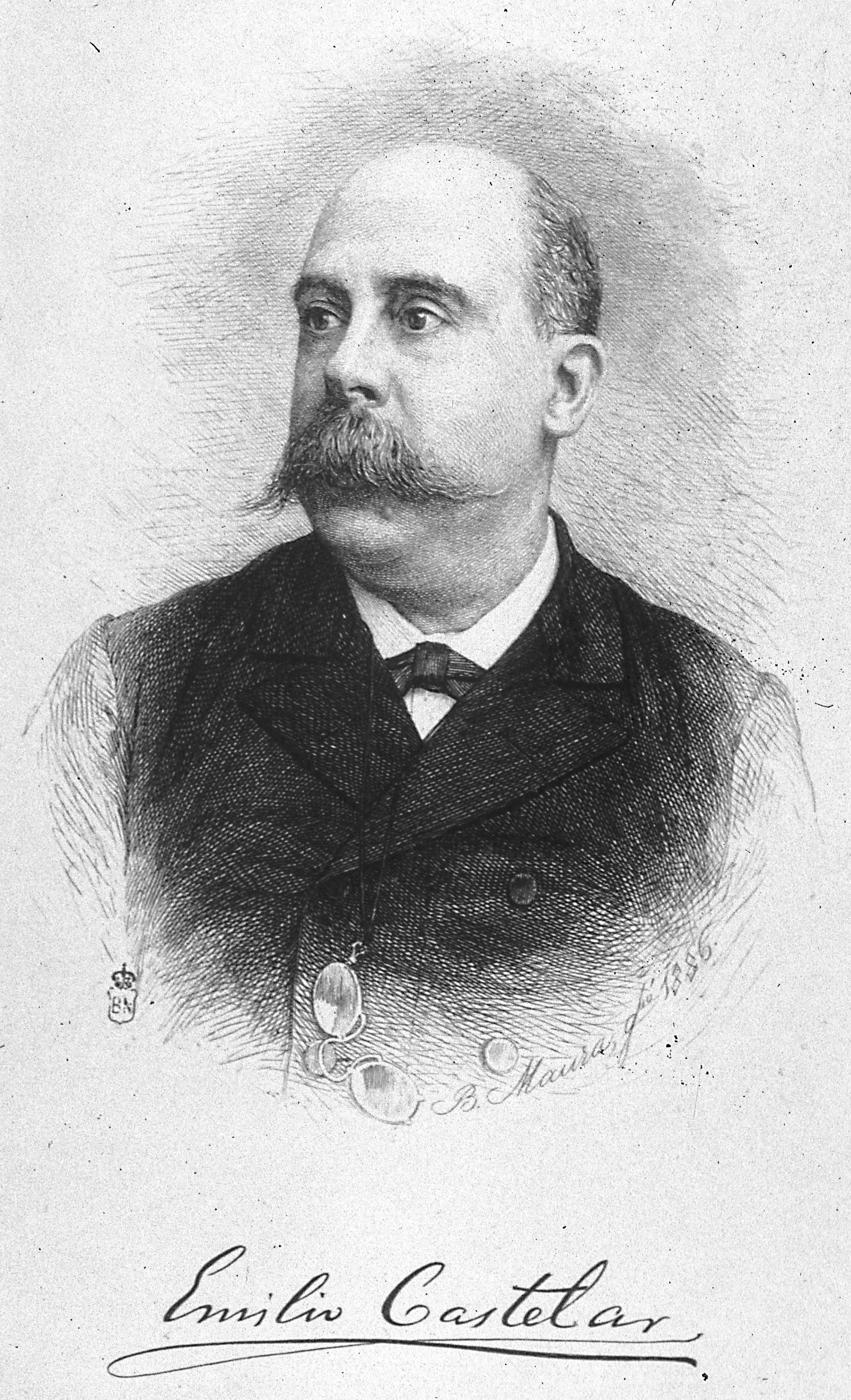 Retrato de Emilio Castelar, político español nacido en Cádiz.